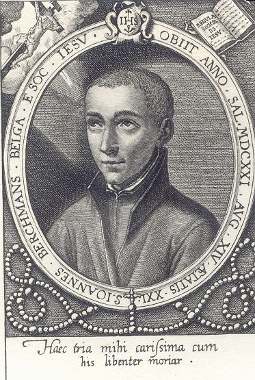 Gravure ancienne de Saint Jean Berchmans, jeune jésuite belge (1599-1621)